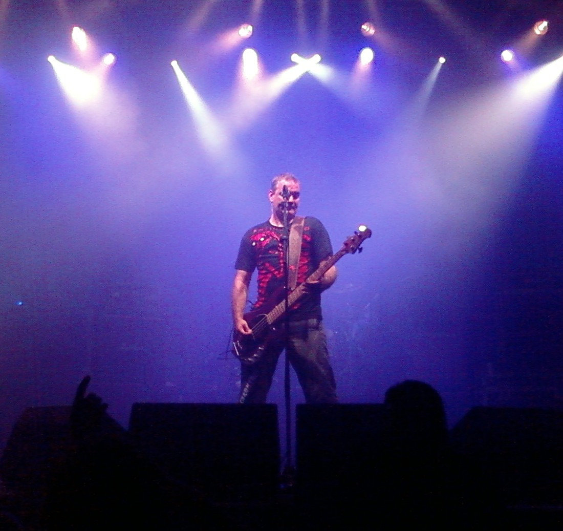 Fernando Madina de Reincidentes, durante una actuación en la sala Razzmatazz de Barcelona en Mayo de 2008.